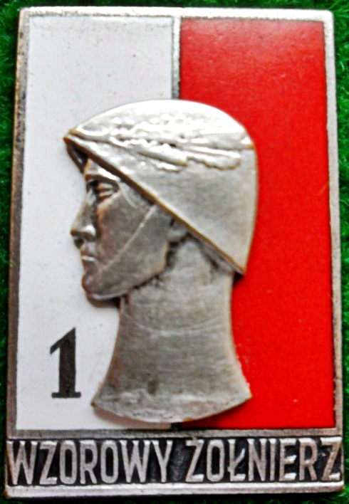 Odznaka Wzorowy Żołnierz